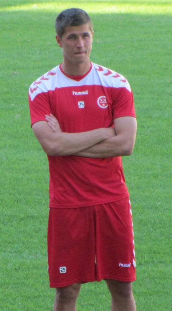 weber